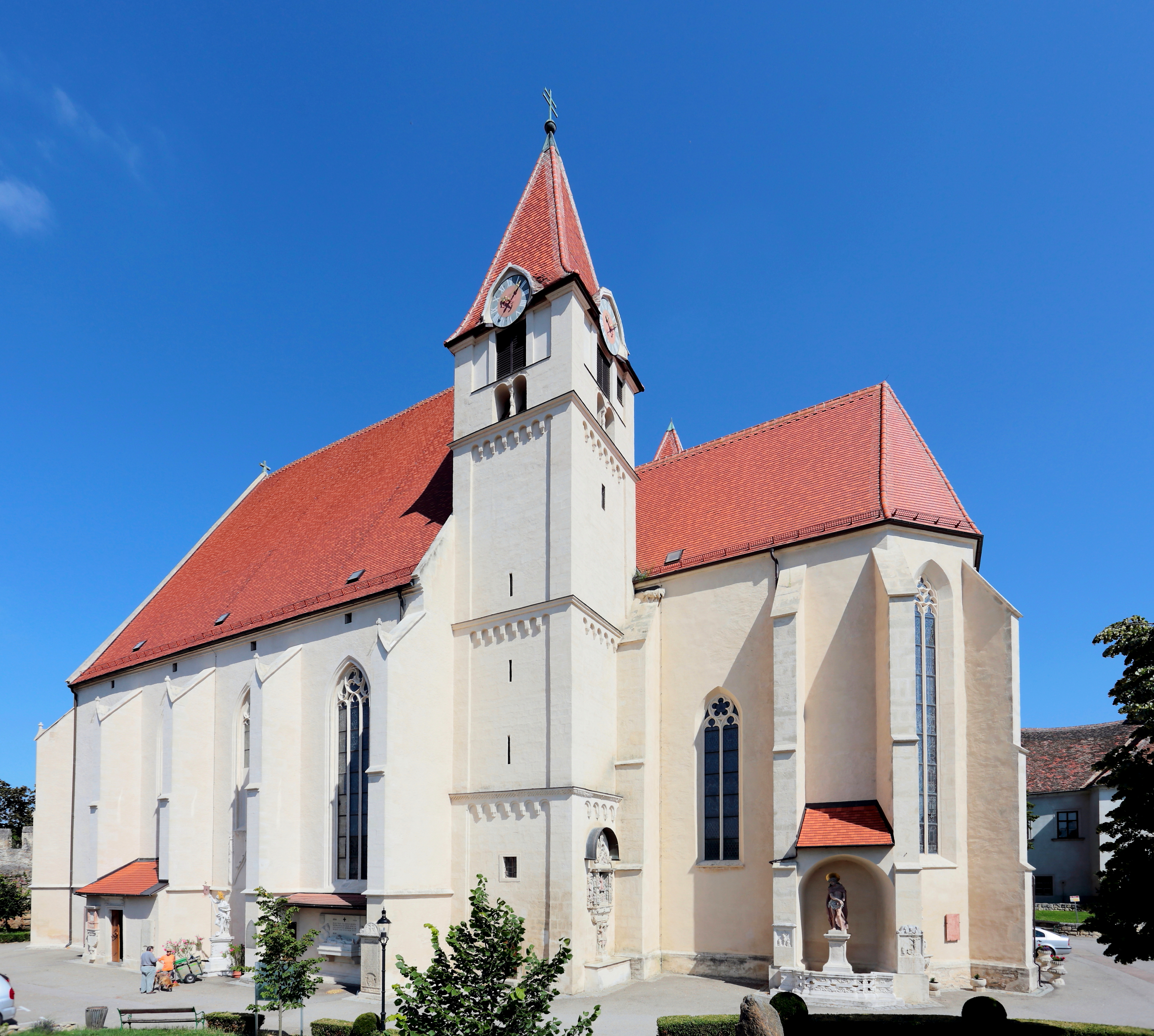 Südostansicht der röm.-kath. Pfarrkirche hl. Stephanus in der niederösterreichischen Stadt Eggenburg. Die Kirche wurde 1537 geweiht und im 18. Jahrhundert teilweise barockisiert. Ende des 19. Jahrhunderts erhielt sie ihre neugotische Einrichtung.